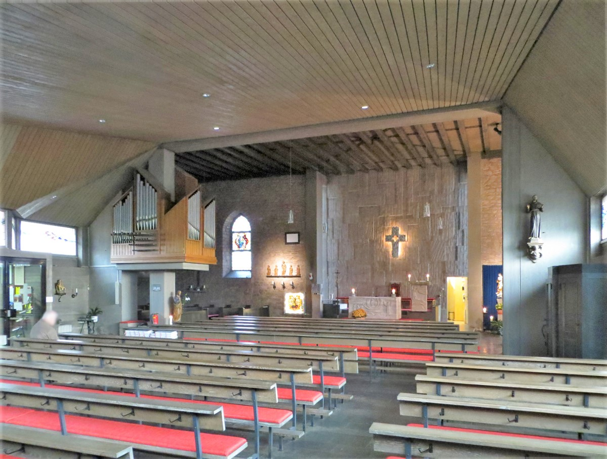 Blick ins Innere der katholische Kirche Mariä Geburt in Bexbach-Höchen, Saarpfalz-Kreis, Saarland.